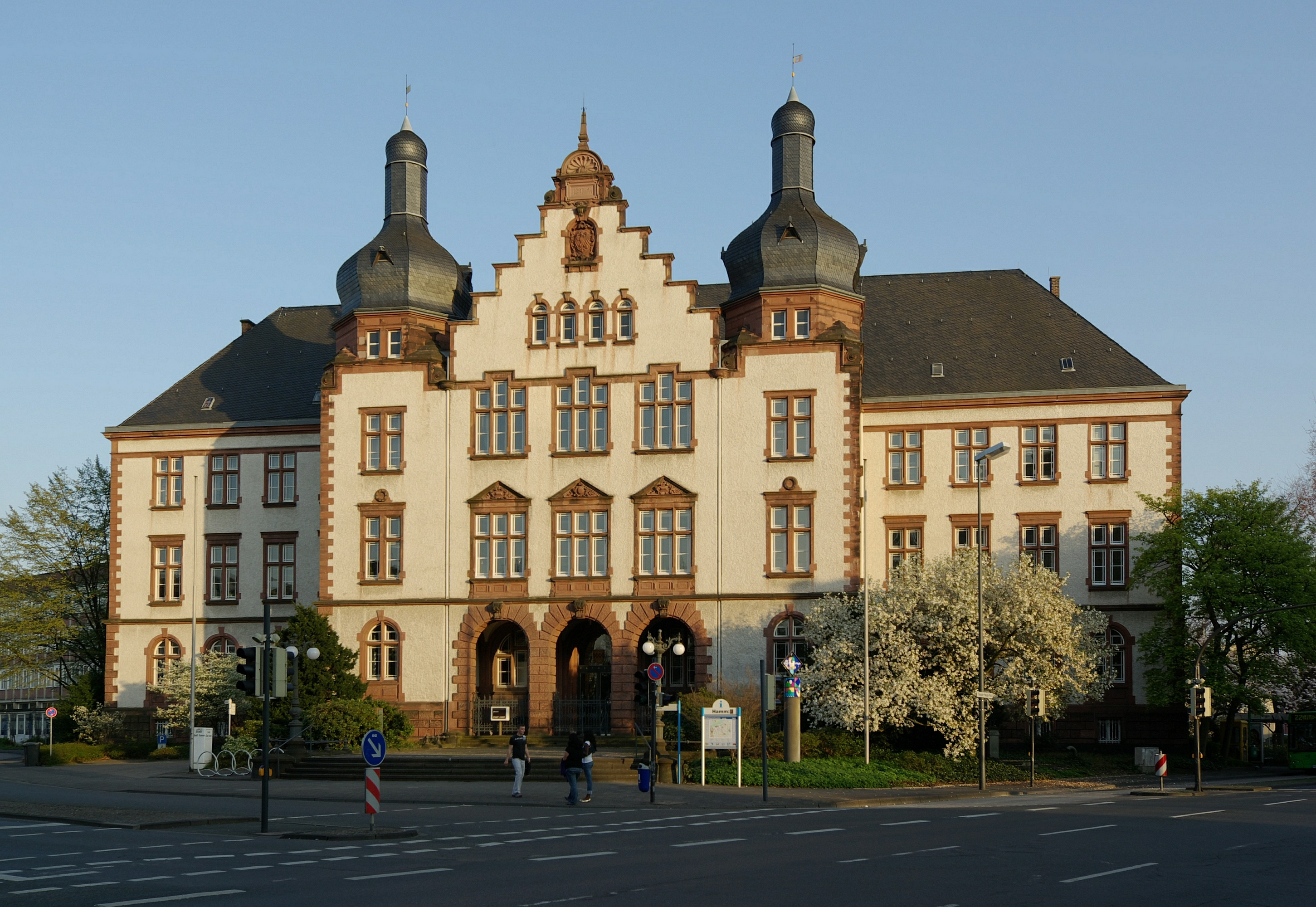 Hamm, Nordrhein-Westfalen